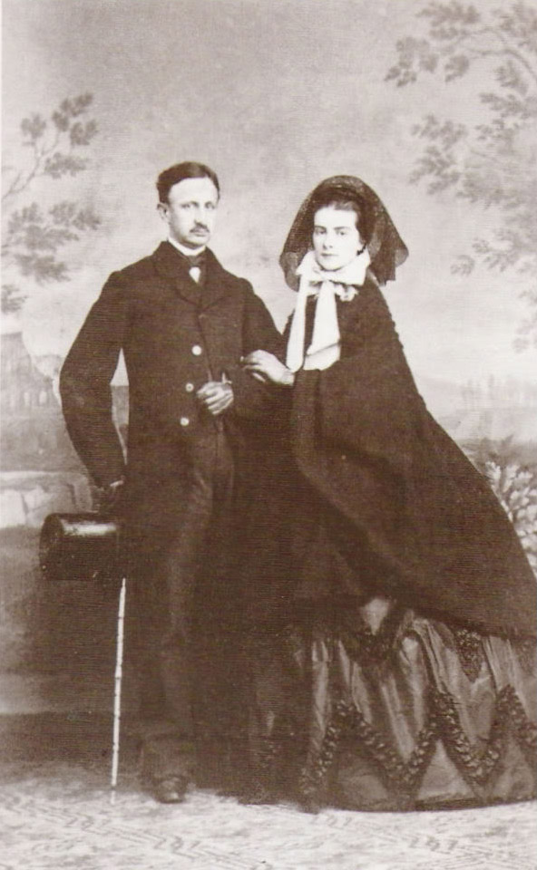 Francesco II (Francesco II delle Due Sicilie) e Maria Sofia nel 1865 da [1]